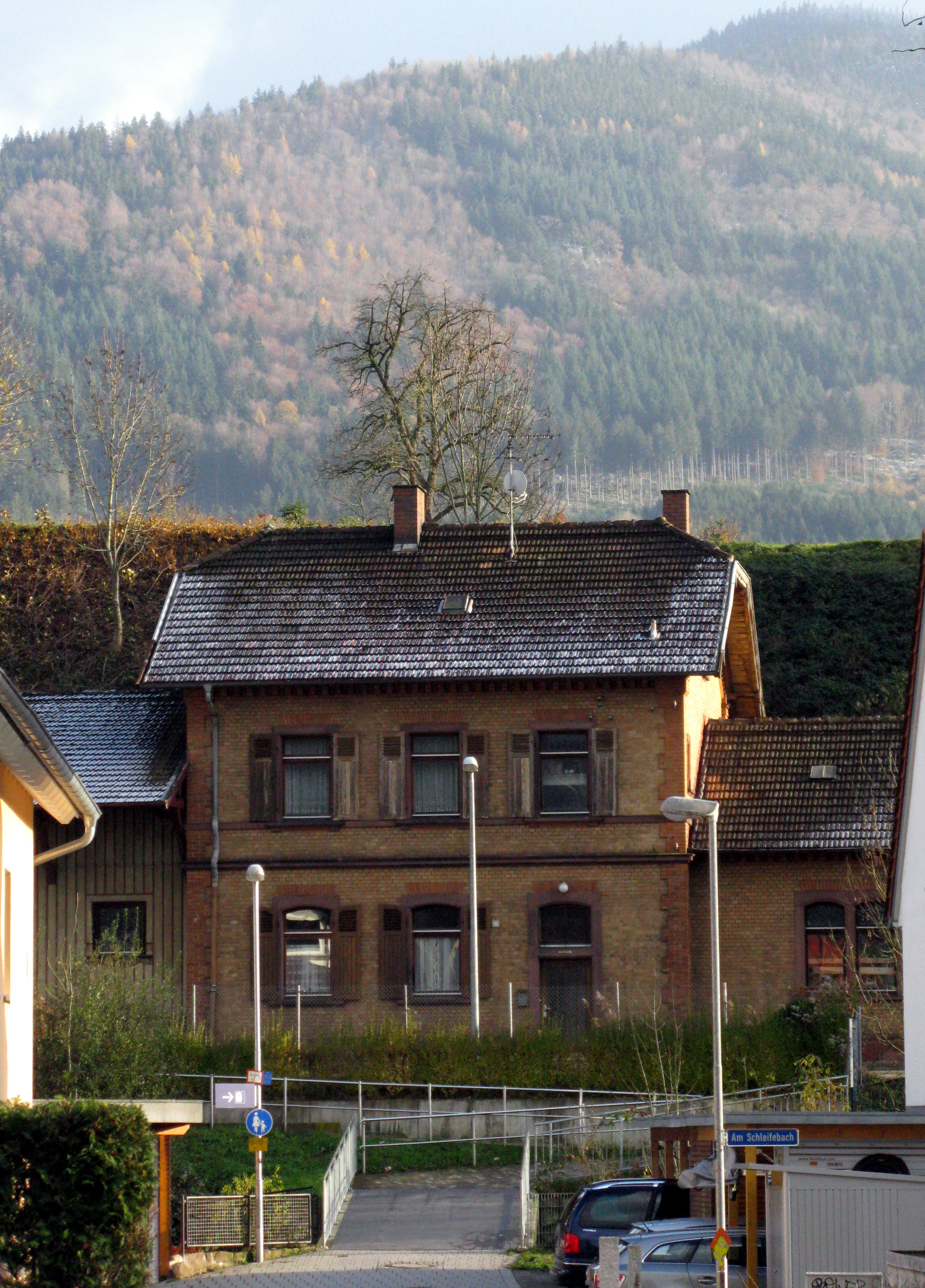 Bahnhof Kollnau